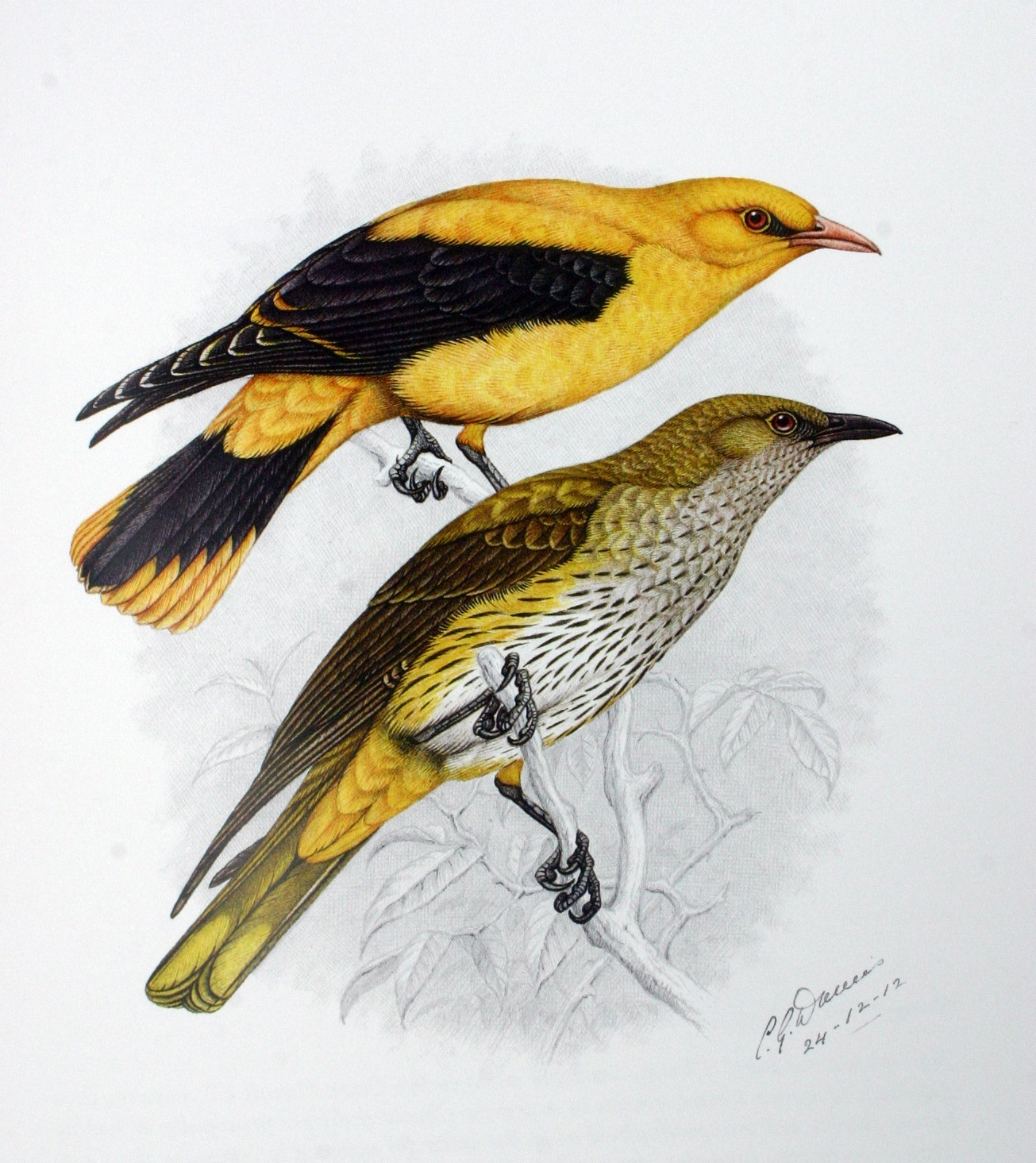 Golden Oriole (Oriolus oriolus) (adult and juvenile males)